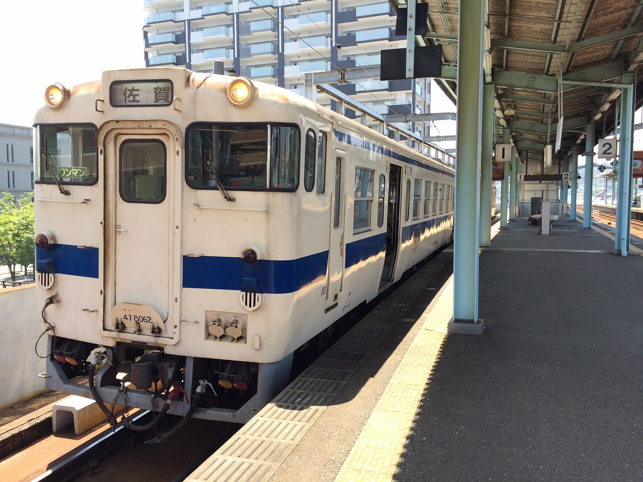 唐津駅に停車中の唐津線用キハ47形列車